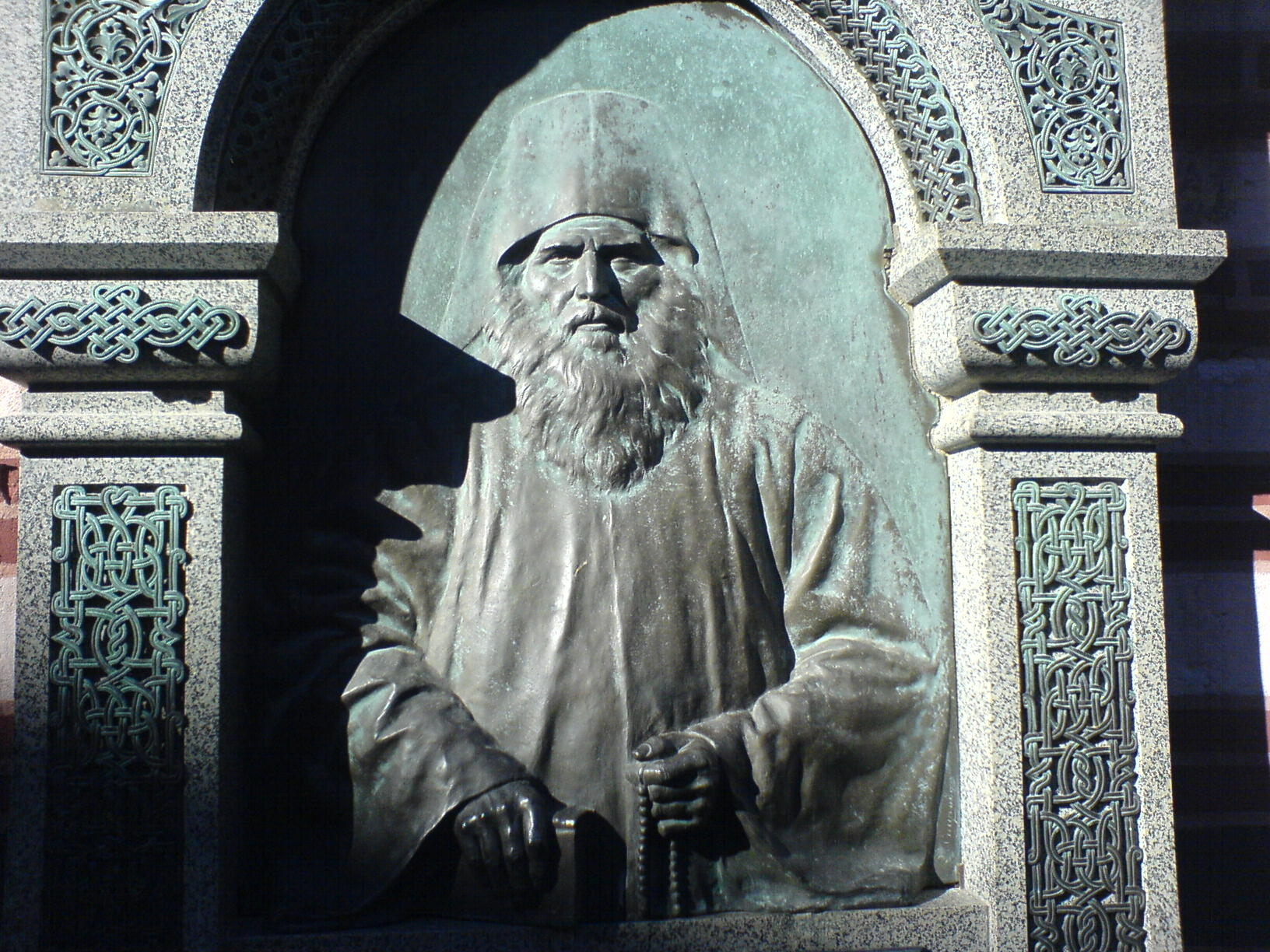 Neofit Rilski-grave Rila monastery-Bulgaria